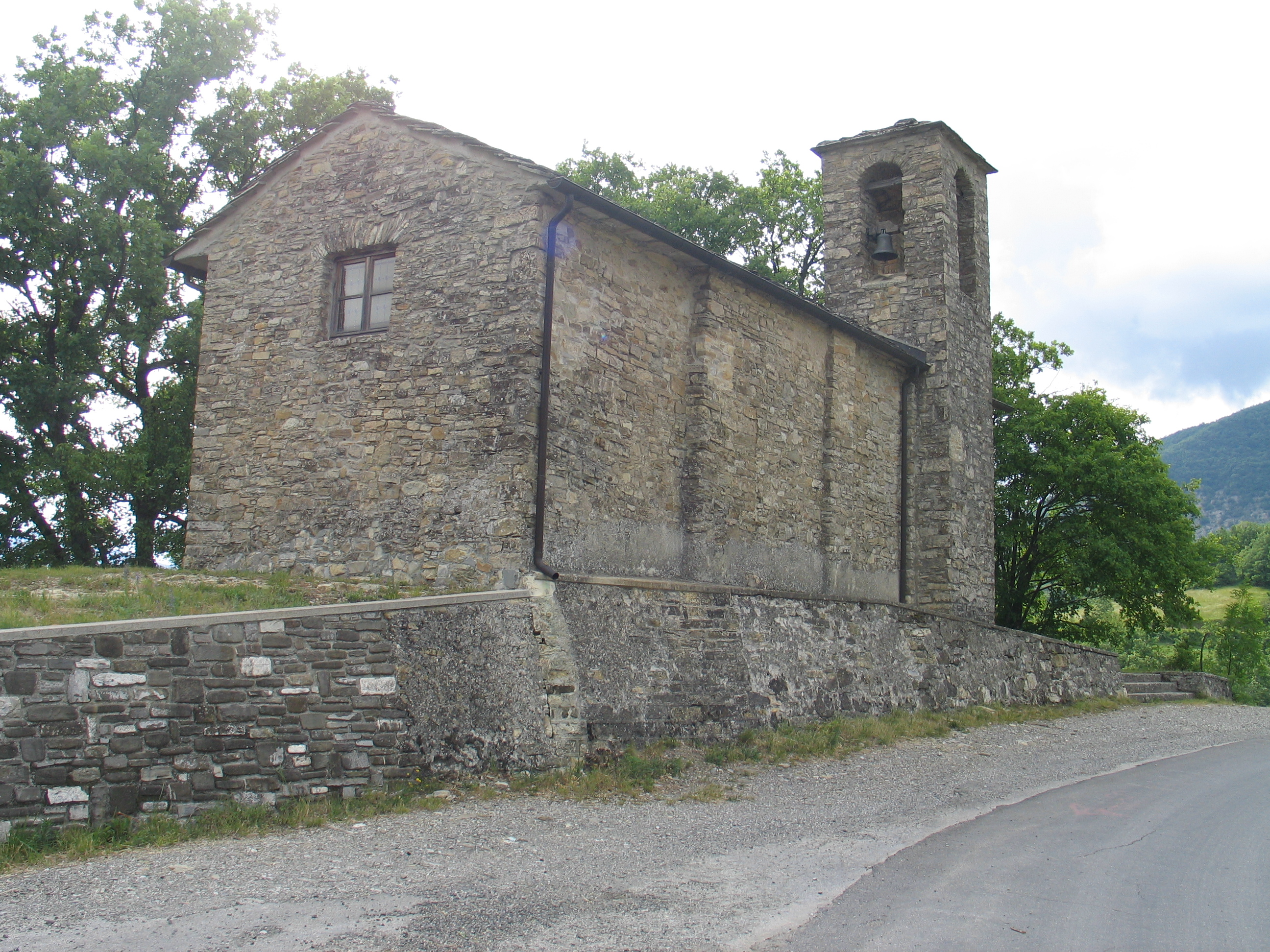 Chiesa di San Siro vicino a Bardi, Parma, Italia